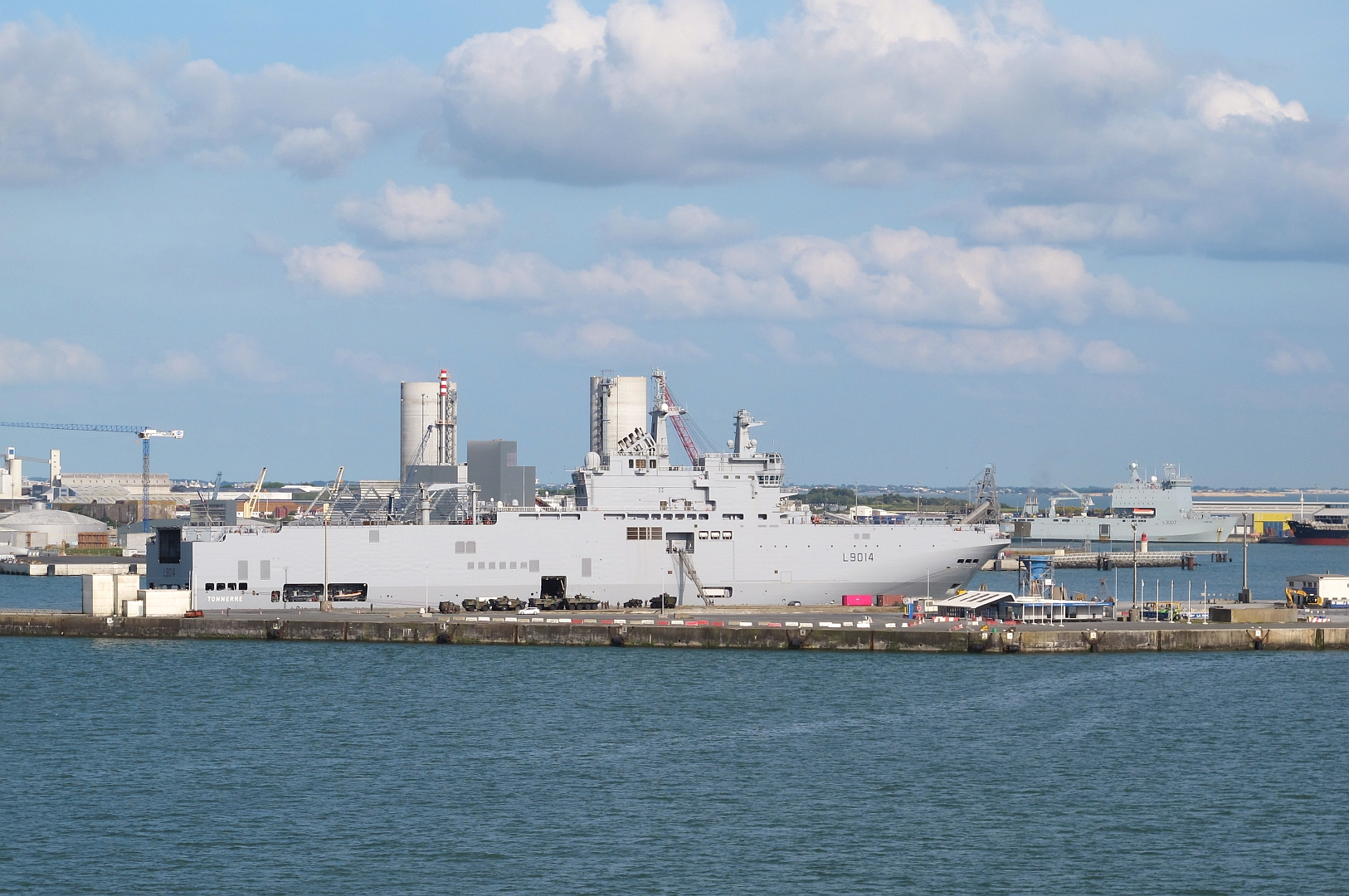 Le porte-hélicoptères Tonnerre (L9014) et le LSD Lyme Bay (L3007) au port de La Rochelle 1er juin 2018.